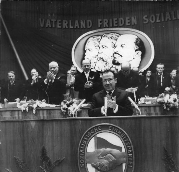 Zentralbild Kollektiv Me-Qu 21.1.1963 VI. Parteitag der SED vom 15.-21.1.1963 in der Werner-Seelenbinder-Halle in Berlin (6.Tag). UBz. Der Generalsekretär der KP Spaniens, Santiago Carillo, bei seiner Grußansprache. (Junge)